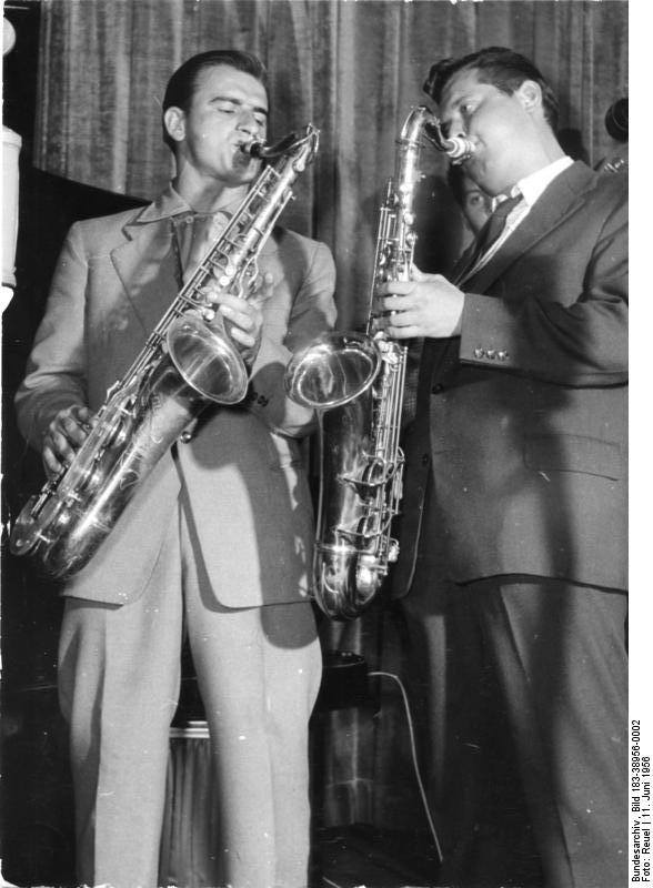 Berlin, erste öffentliche Jazzveranstaltung Zentralbild/Reuel, 13.6.1956Erste öffentliche Jazzveranstaltung Die Diskussion ueber den Jazz, den echten und den verfälschten, hat in der demokratischen Presse und in Jugendforen die Gemüter erhitzt. Zur Klärung der strittigen Fragen veranstaltete die Interessengemeinschaft Jazz-Berlin am 11. Juni 1956 im Kultursaal des Ministeriums für Post- und Fernmeldewesen Berlin einen Jazzabend. Jazzfreunde aus dem demokratischen Sektor und Westberlin waren bei dieser Veranstaltung Ausübende und Zuhörer. UBz: Saxophone erklingen in den Jazzrythmen. Benny Mämpe (rechts) und Horst Deutschendorf mit ihren Tenor-Saxophonen.